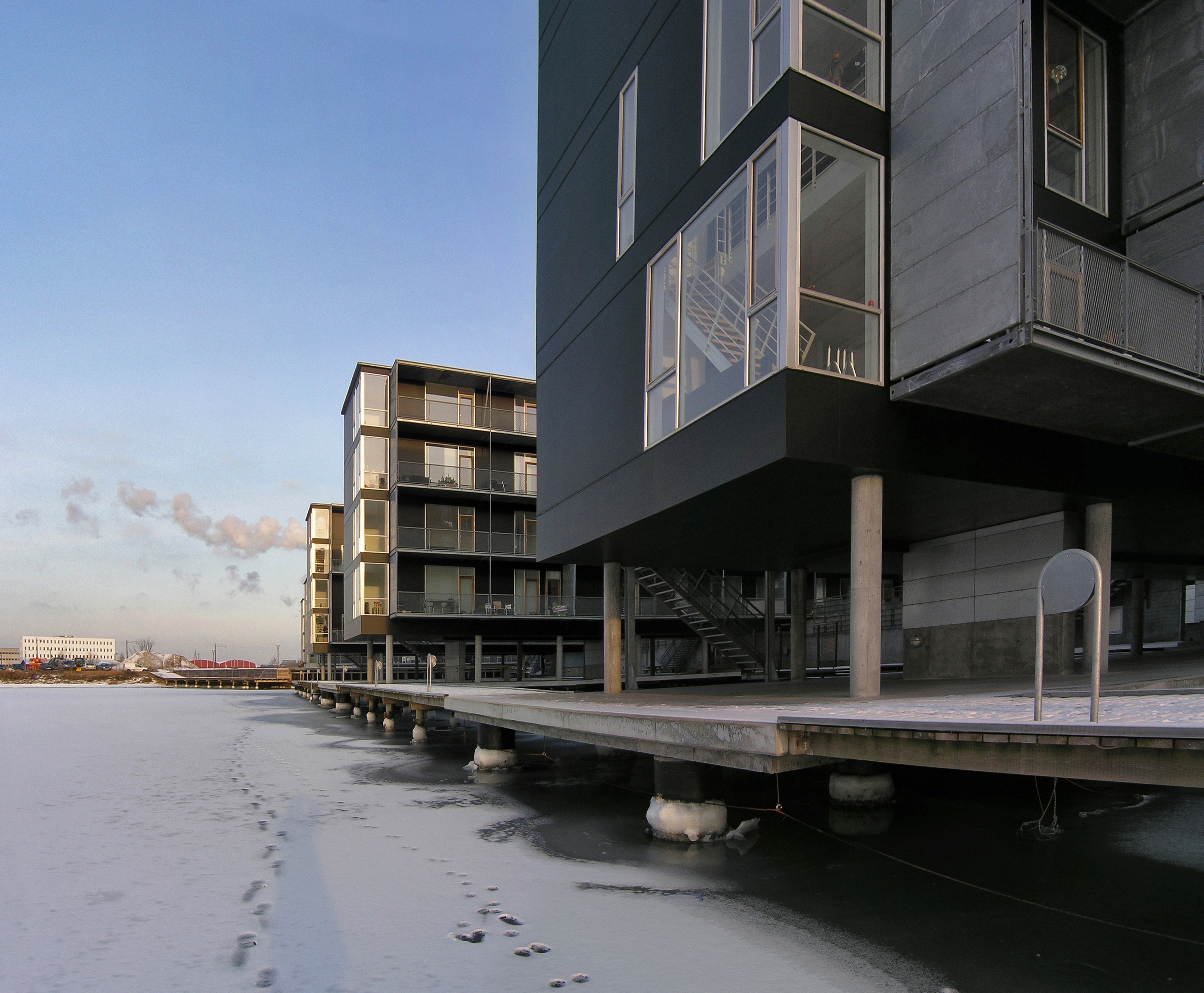 Teglværkshavnen Harbour housing, Copenhagen, Denmark 2003-2008. Architects: Tegnestuen Vandkunsten.